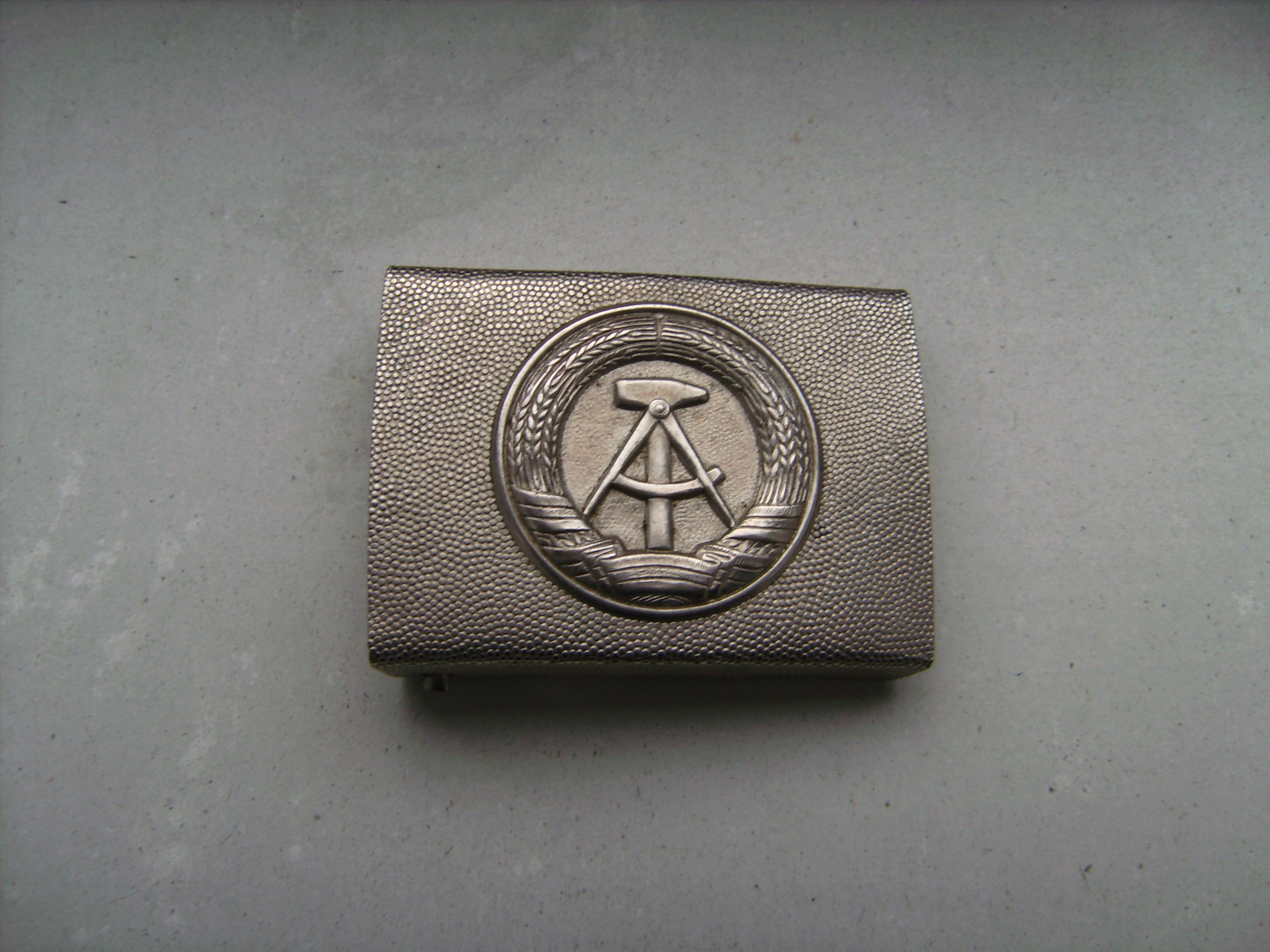 Koppelschloss, genutzt für Uniformkoppel für Mannschaften und Unteroffiziere der NVA und des MfS.